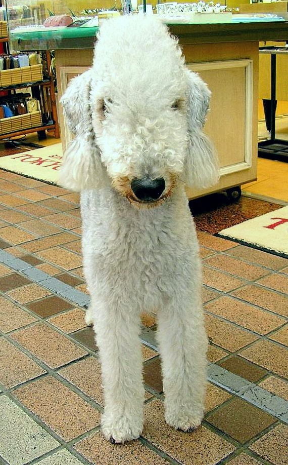 Bedlington Terrier